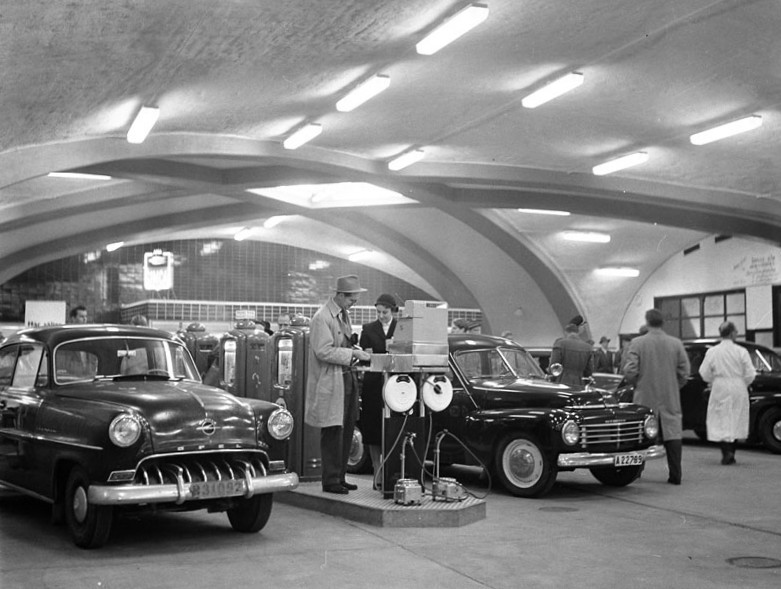 Katarinabergets skyddsrum och garage, invigning av bensinstationen oktober 1955